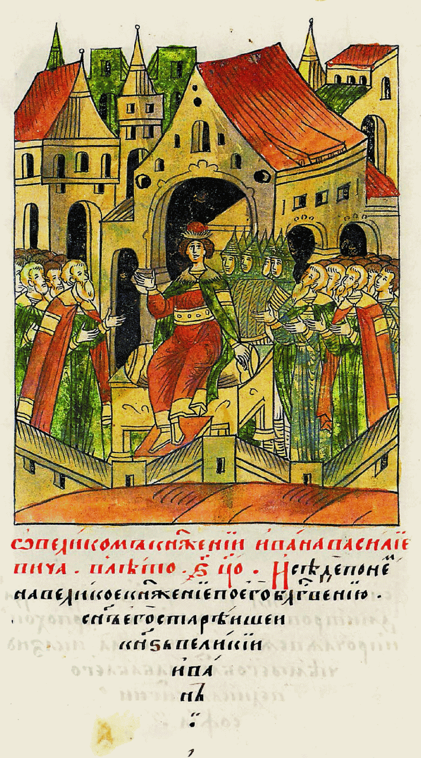 О великом княжении Ивана Василиевича. В 6970 году сел после него на великое кня- жение по благослове- нию сын его старший великий князь Иван.